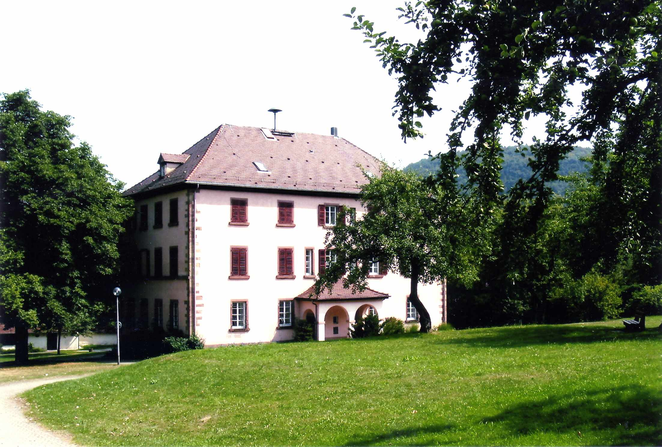 Quelle: Stadtarchiv Albstadt